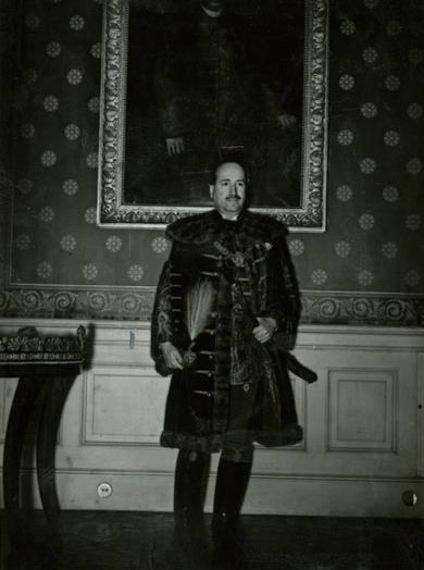 Bánffy Dániel földművelésügyi miniszter (1940–1944)